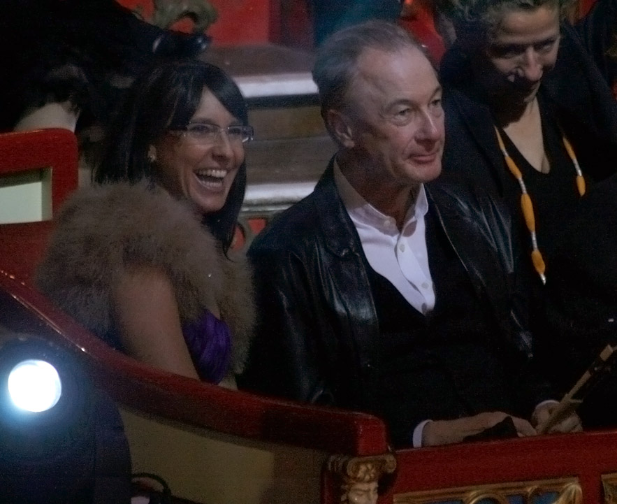 Verleihung des Nestroy-Theaterpreises 2009: Maria Köstlinger und Karlheinz Hackl (Circus Roncalli auf dem Wiener Rathausplatz).